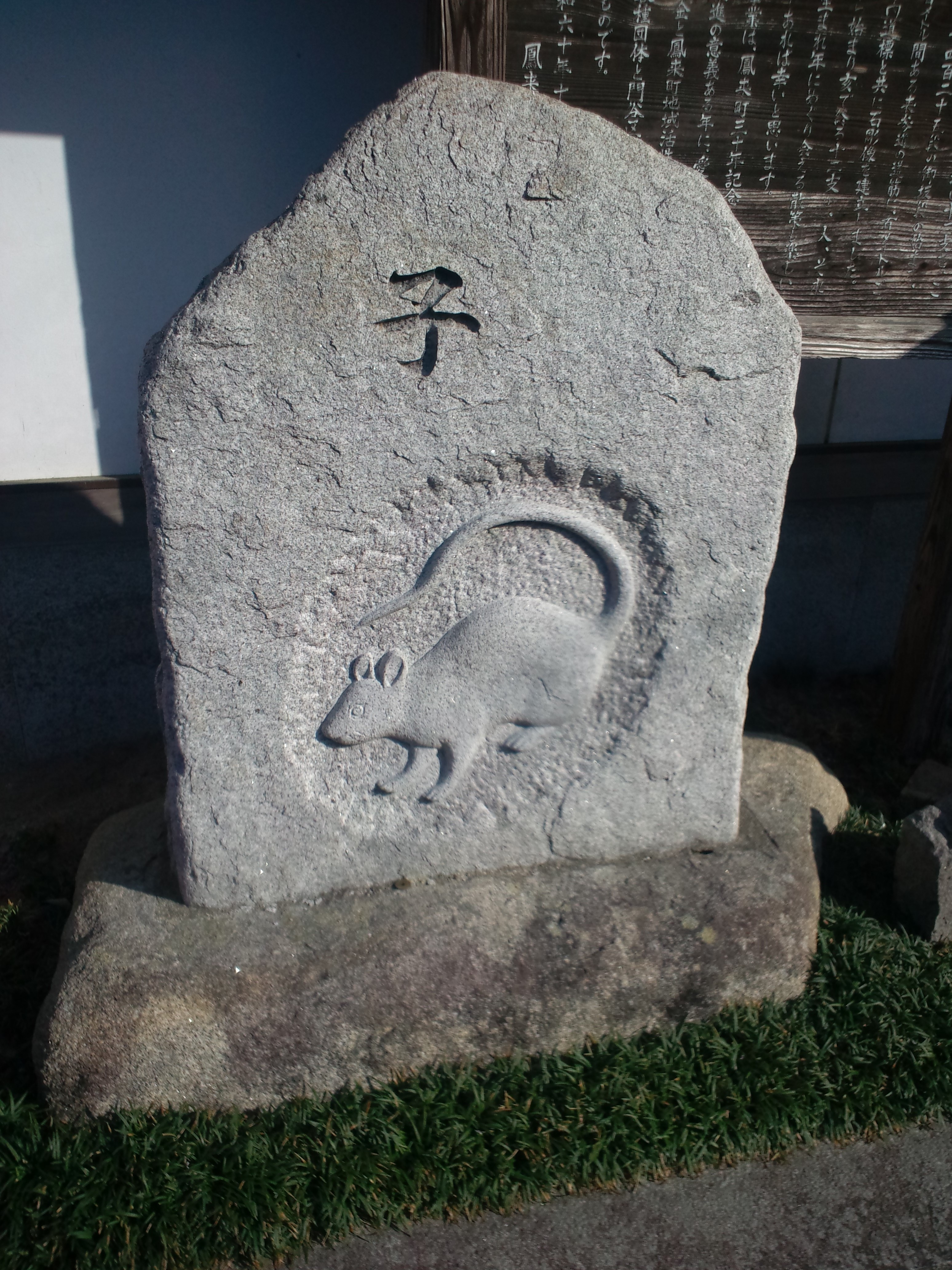 鳳来寺山 子（ね）の石碑